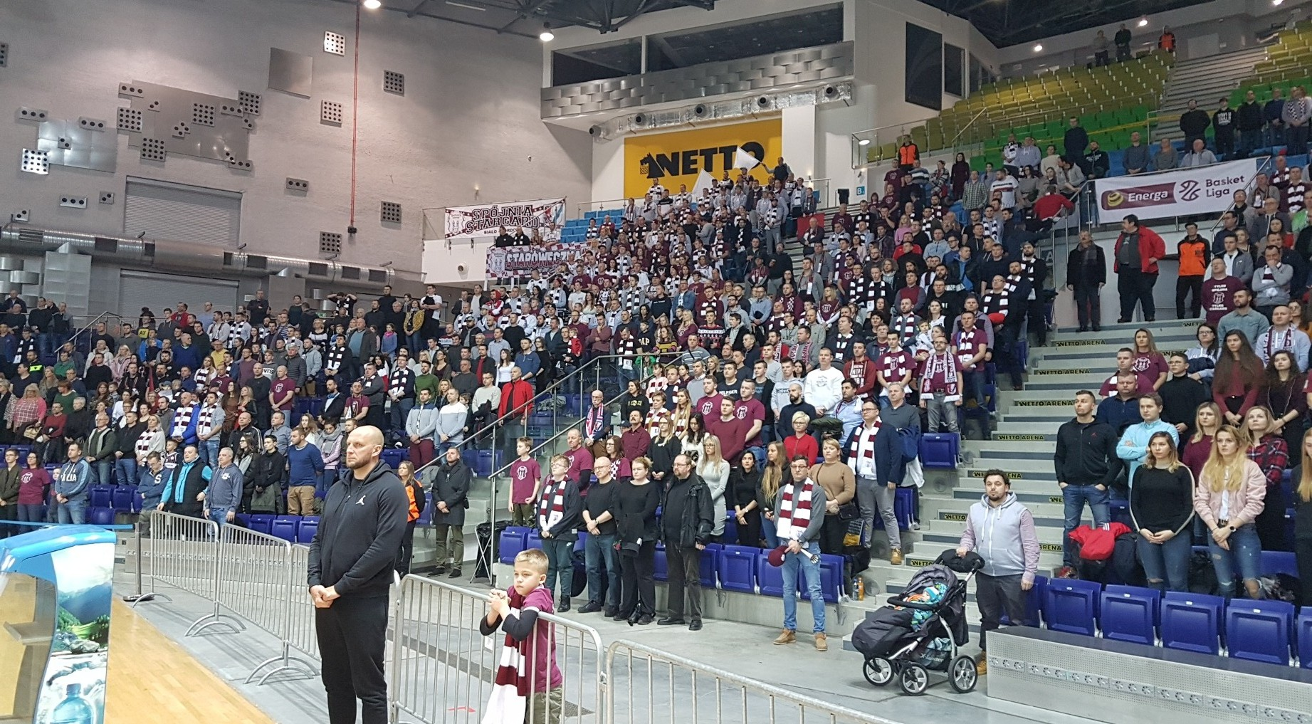 Kibice Spójni w Szczecinie (20.01.2019)